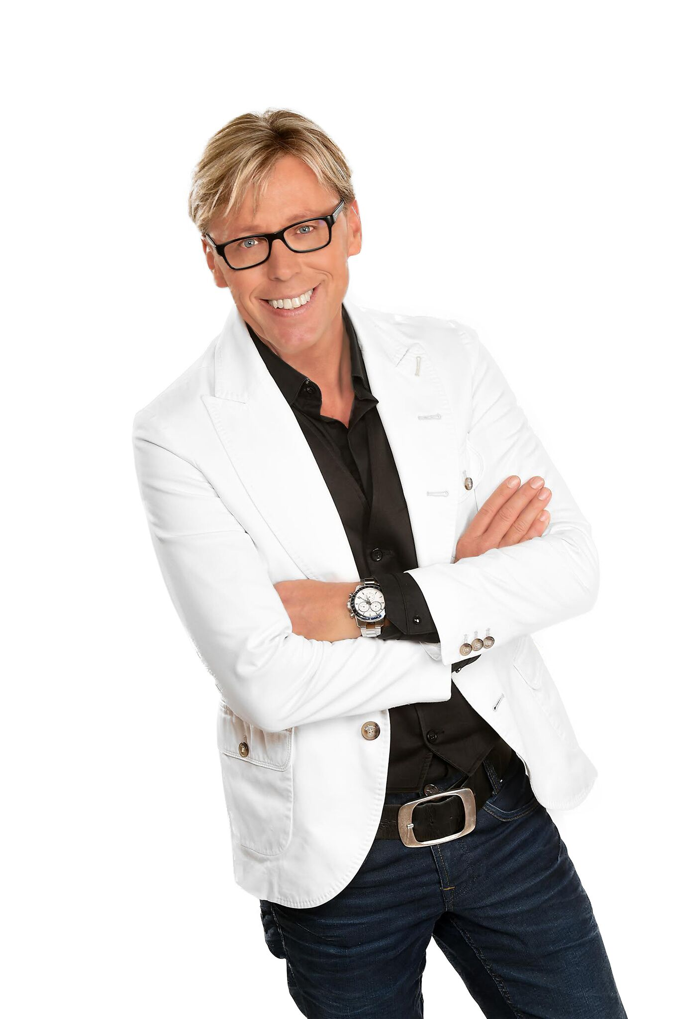 Hansy Vogt Moderator